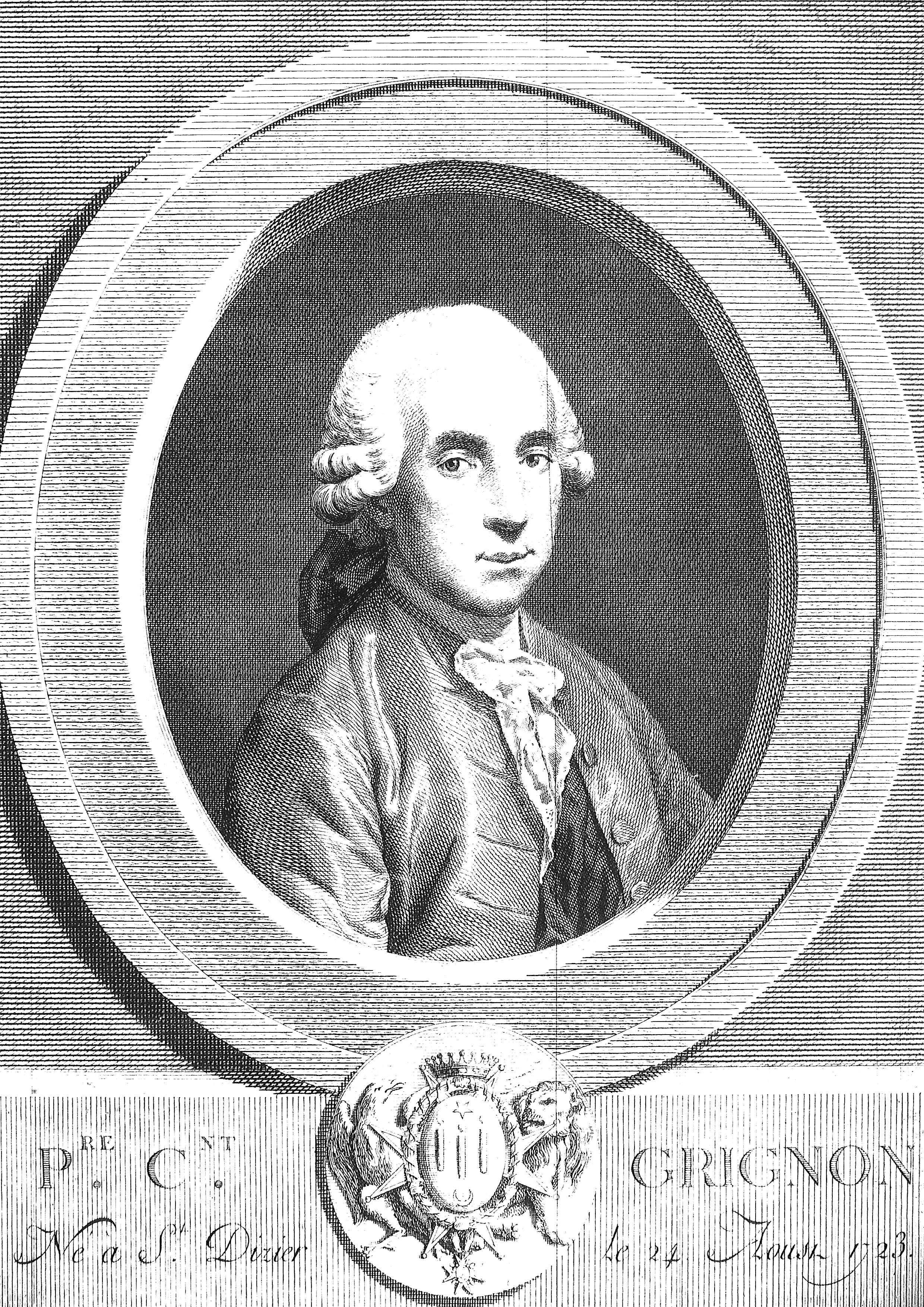 issue de la bibliothèque de reims, microfilm 94.